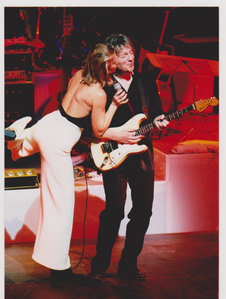 Sheila a l'Olympia 1999